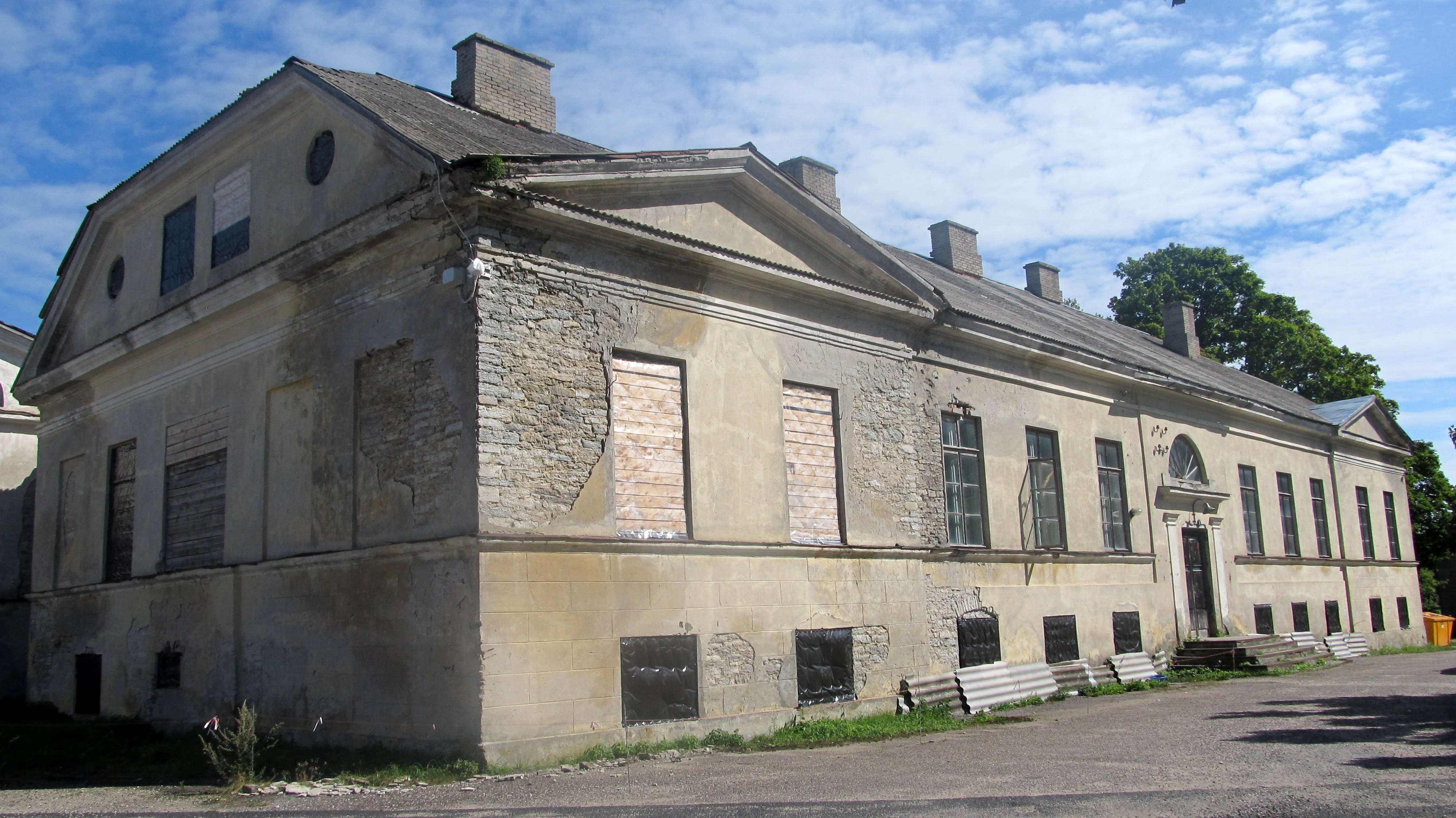 Putkaste mõisa peahoone